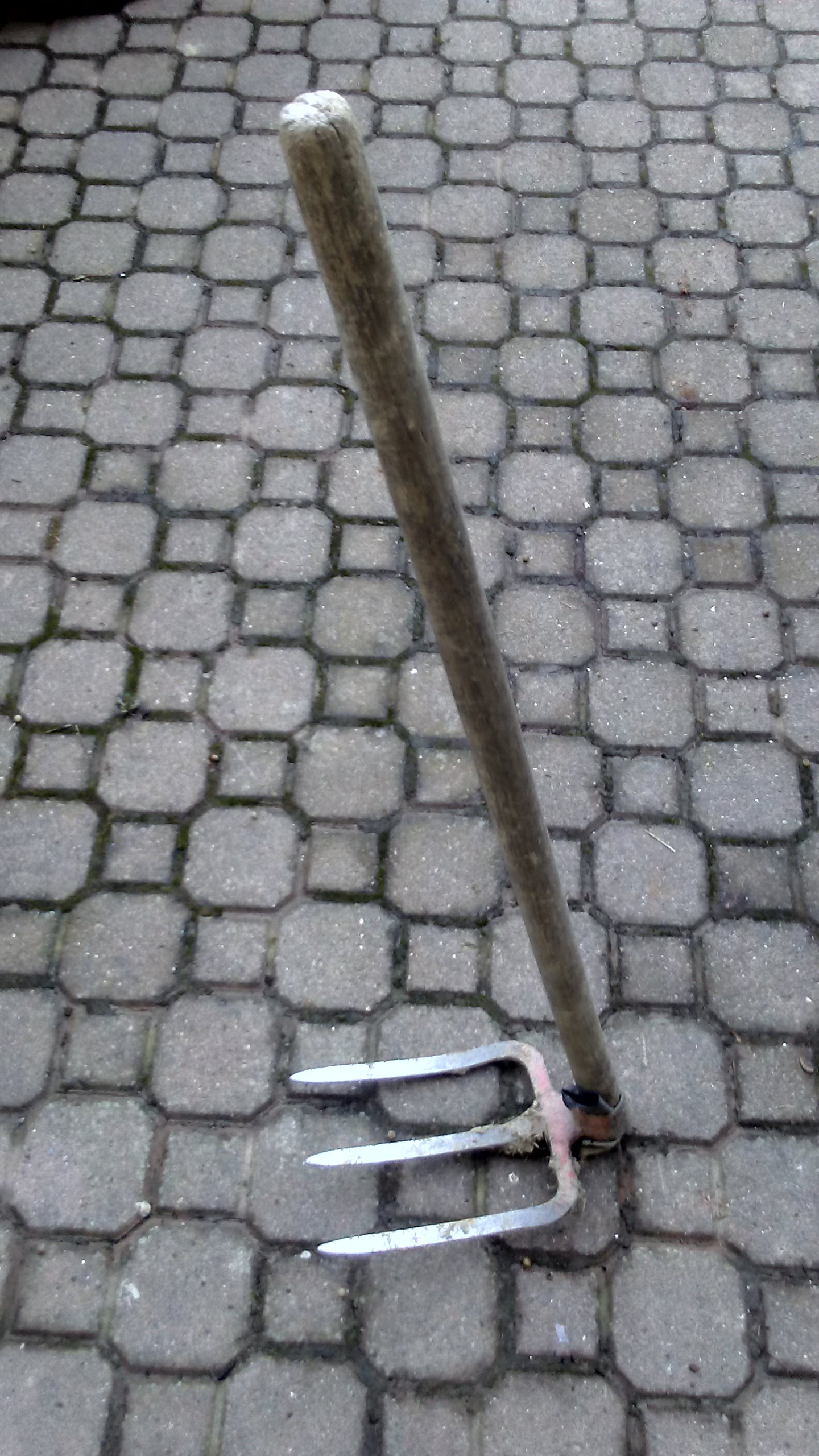 Magaglio vista globale